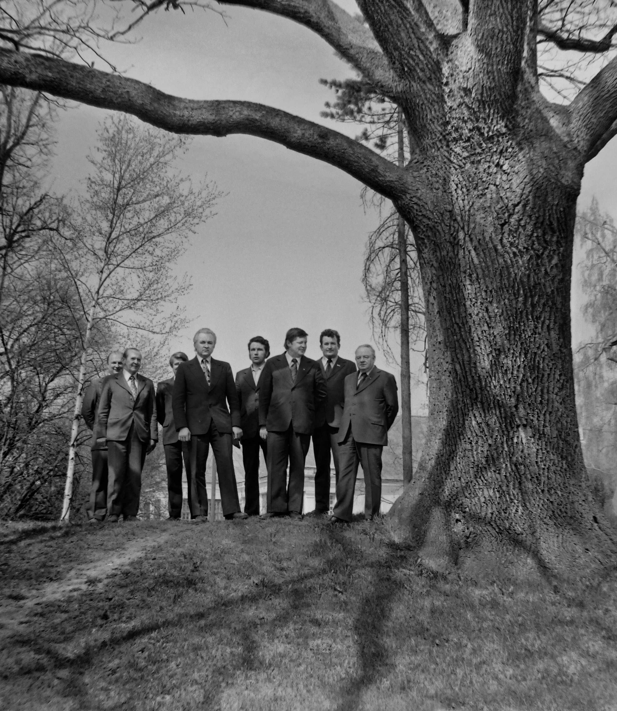 Tamme kõrval esireas Johannes Käbin (EKP Keskkomitee 1.sekretär), Elmo Saar (Antsla ST direktor), Arnold Rüütel (EKP Keskkomitee sekretär).Tagareas alates tammest:Endel Saia (EKP Võru Rajoonikomitee 1.sekretär), Aare Lang (Antsla ST partorg ja õpetaja).